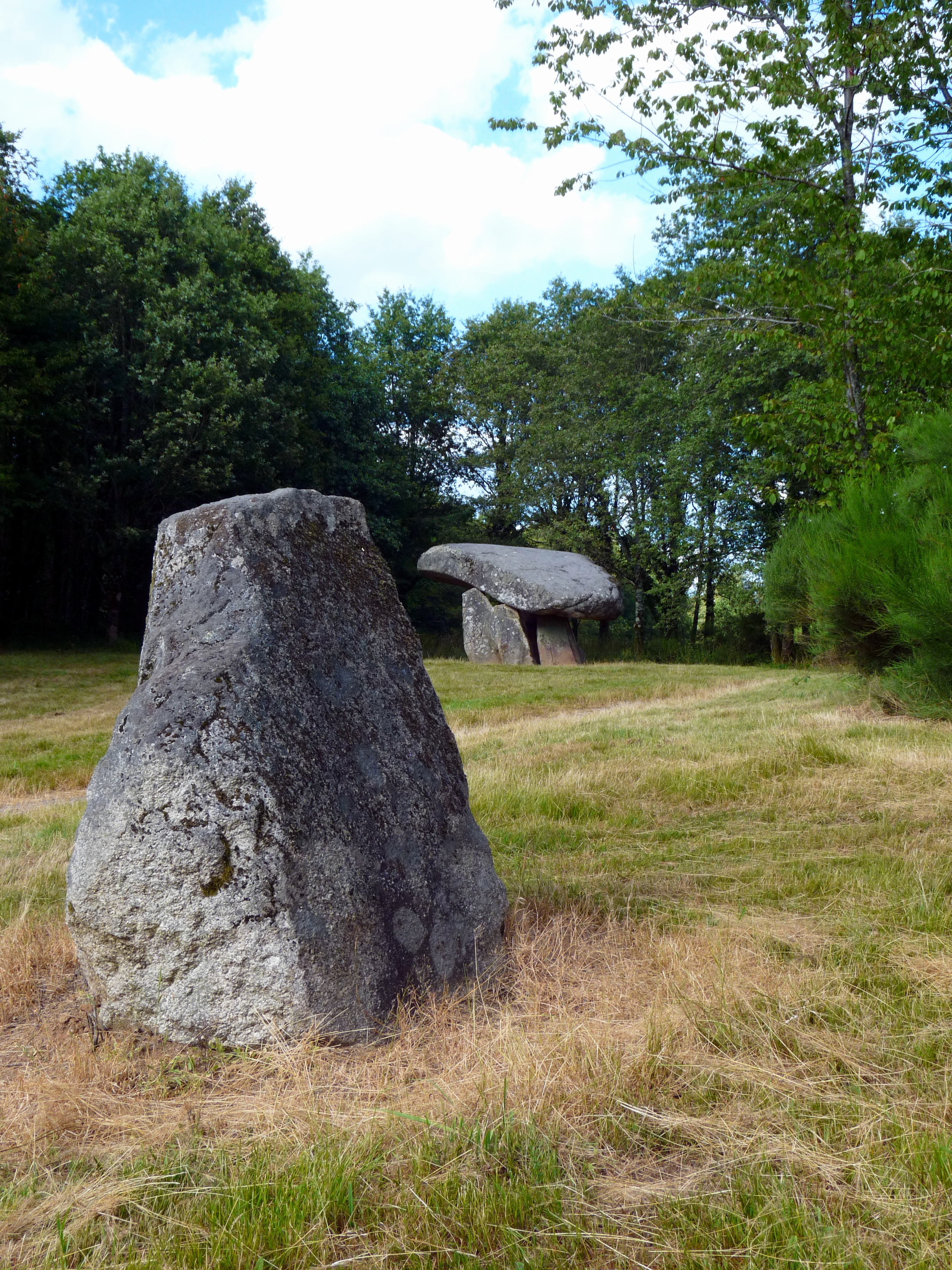 Menhir de Chez Moutaud, (Classé, 1940) .